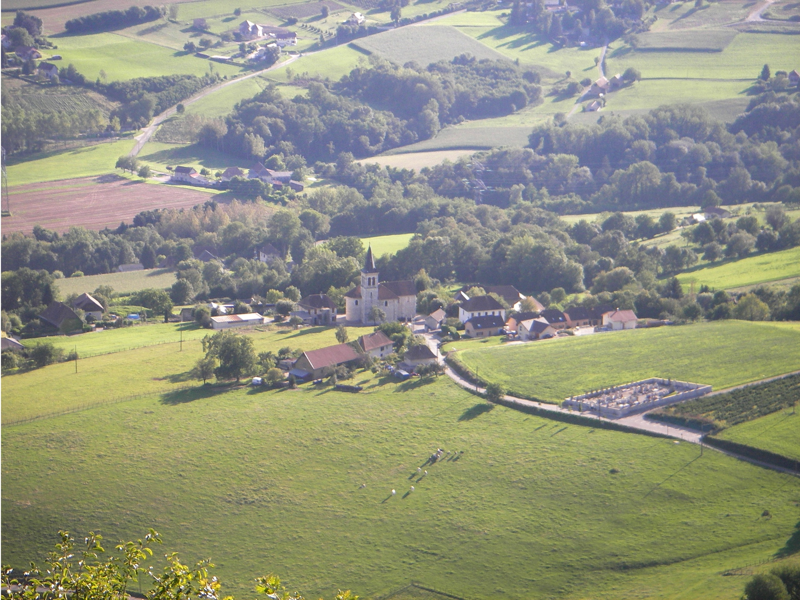 French village Verel-de-Montbel (Savoie) view from the "Belvedère du Grand Bec"